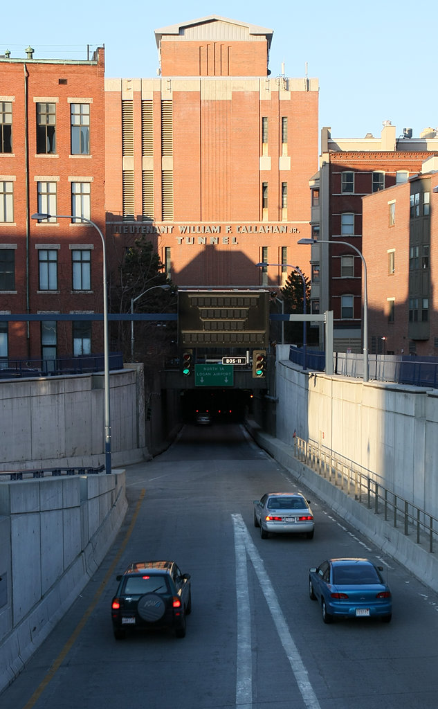 Lt. William F. Callahan Tunnel, Boston, MA